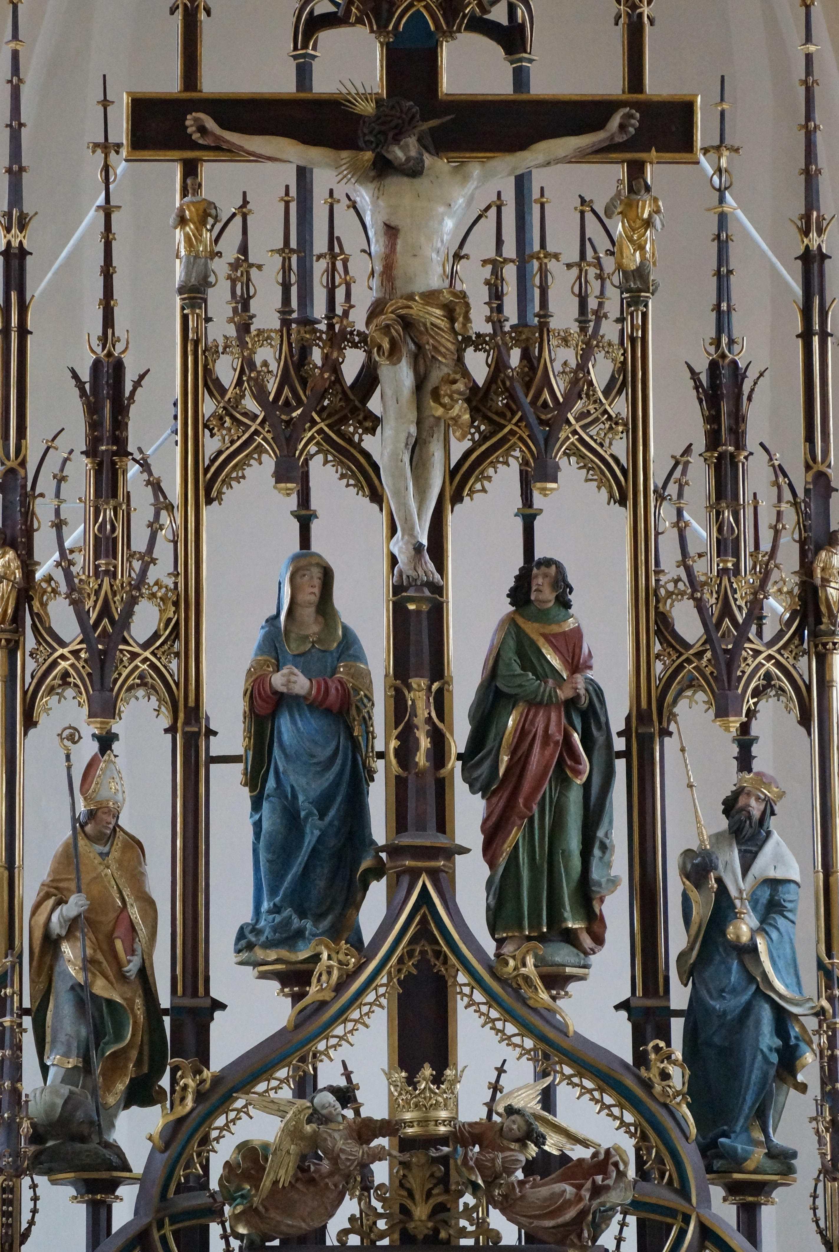 Gesprenge am Leinberger-Altar im Kastulusmünster von Moosburg. Unter Jesus am Kreuz sind Maria und Johannes. Links ist Korbinian und rechts König Sigismund.